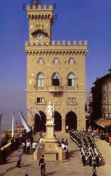 Cerimonia di insediamento dei nuovi Capitani Reggenti in Piazza della Libertà; sullo sfondo il Palazzo pubblico di San Marino.